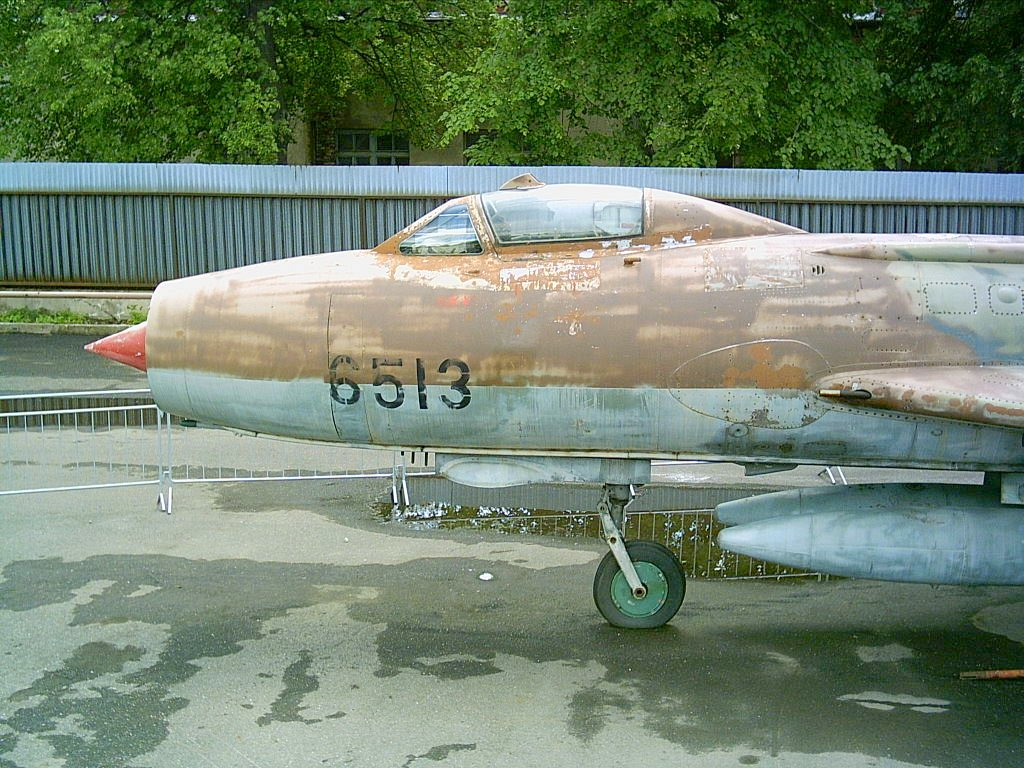 Sukhoi Su-7BKL, Kbely museum, Prague